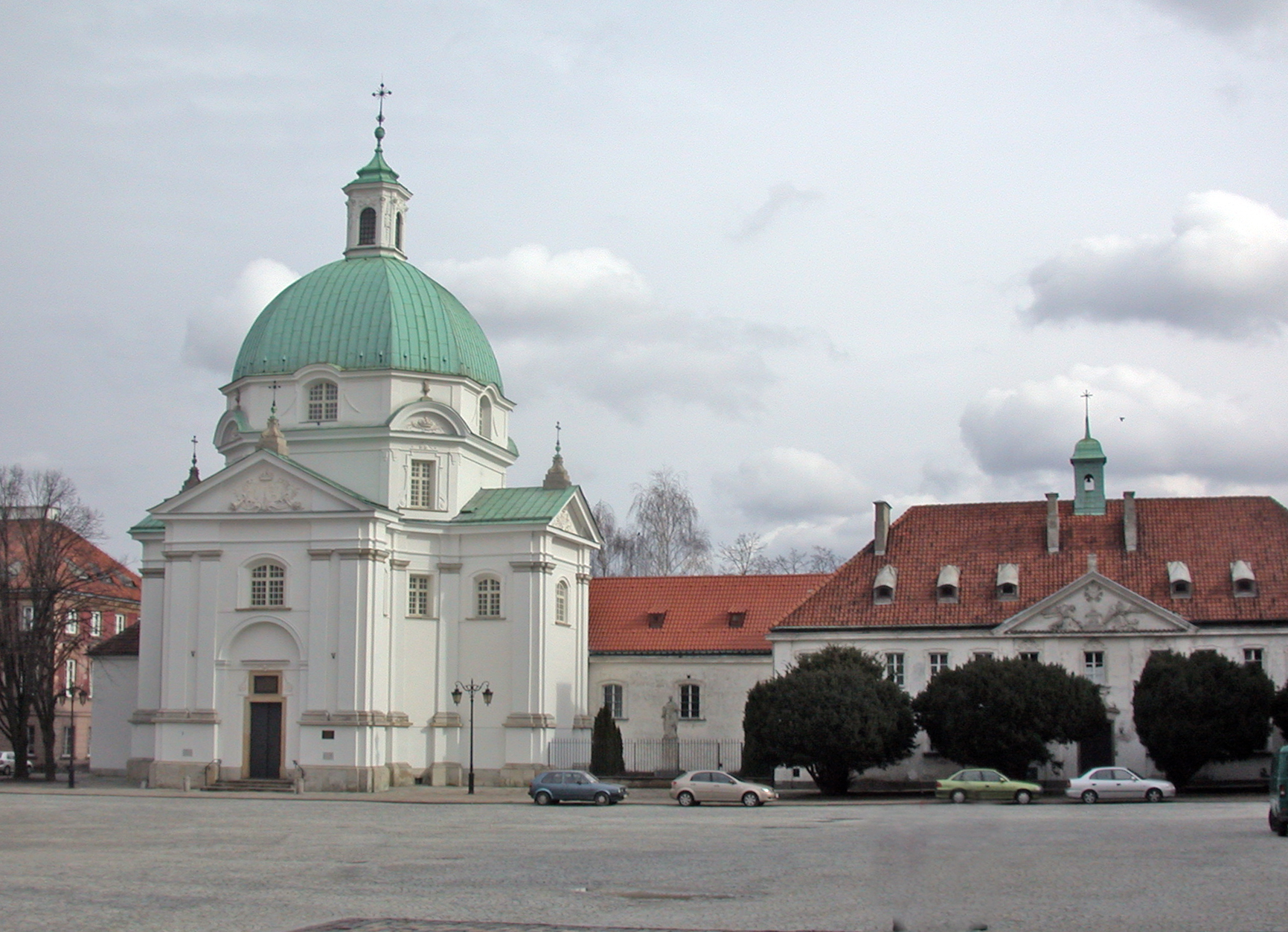 Varsavia, Piazza del Mercato della Città Nuova (Rynek Nowego Miasta), lato orientale, con la chiesa di San Casimiro (kościół Św. Kazimierza).